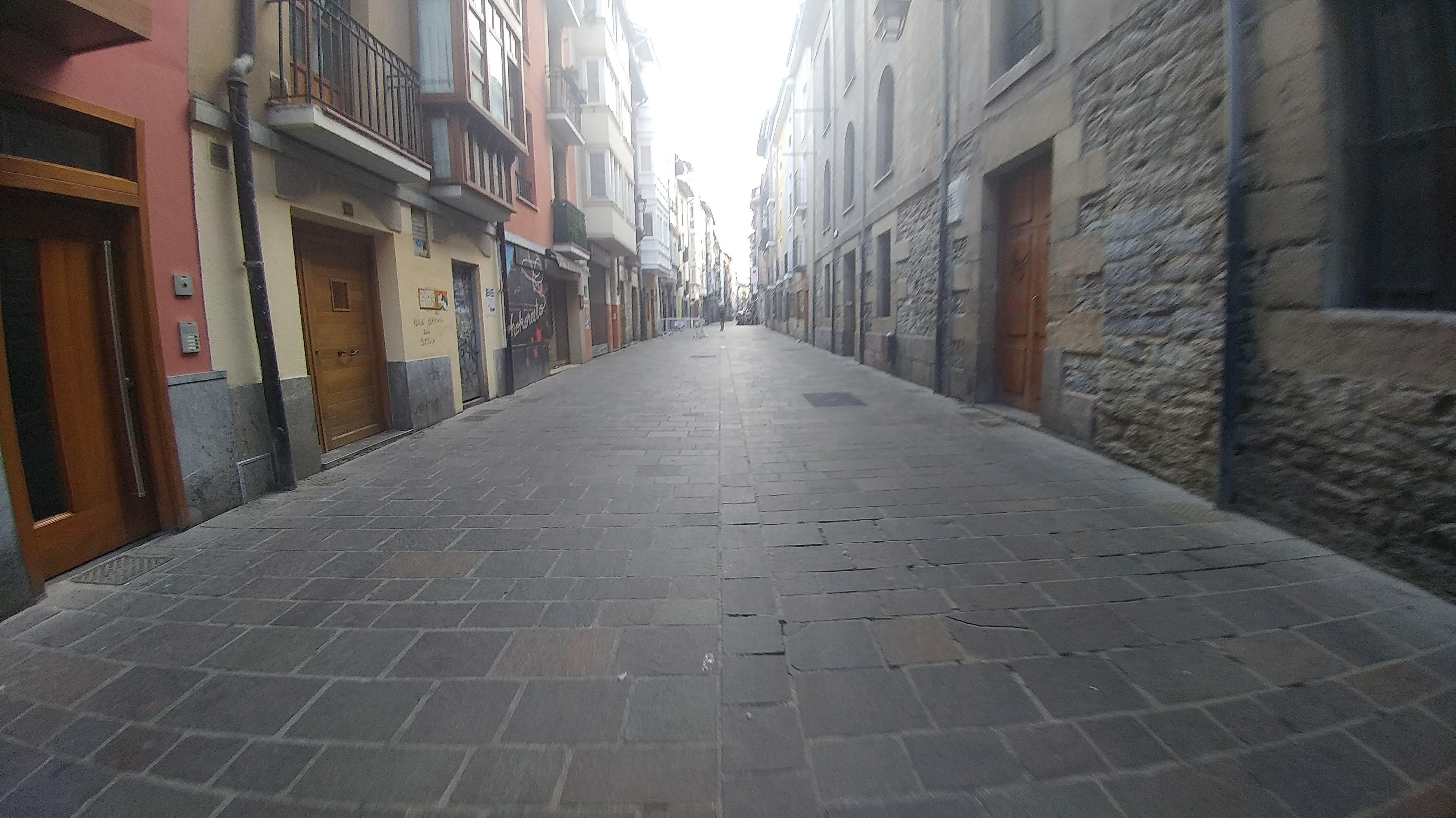 Gasteizko kalea